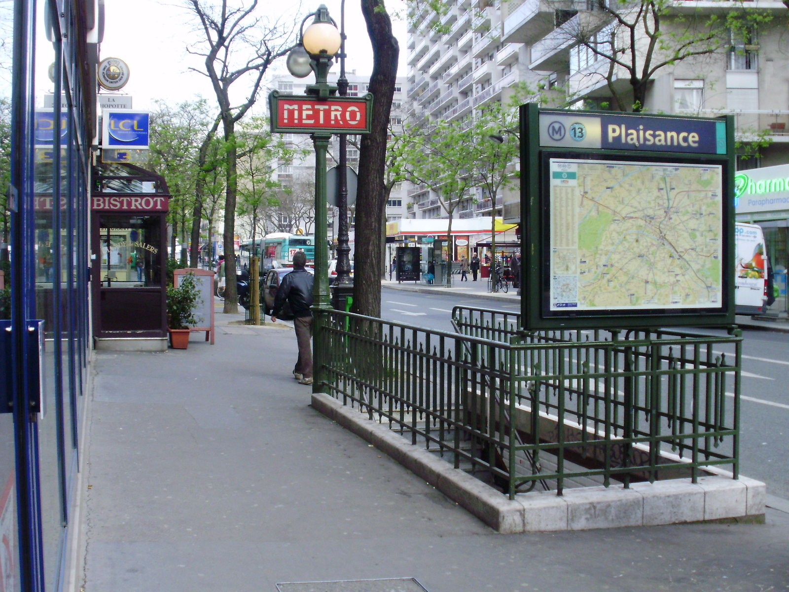 Sortie 2 du métro Plaisance